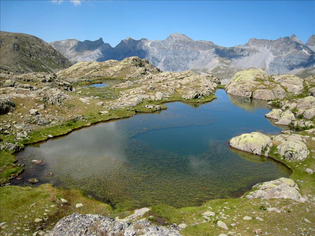 Vue du lac Médian de Morgon (2470 m), dans la vallée de la Tinée